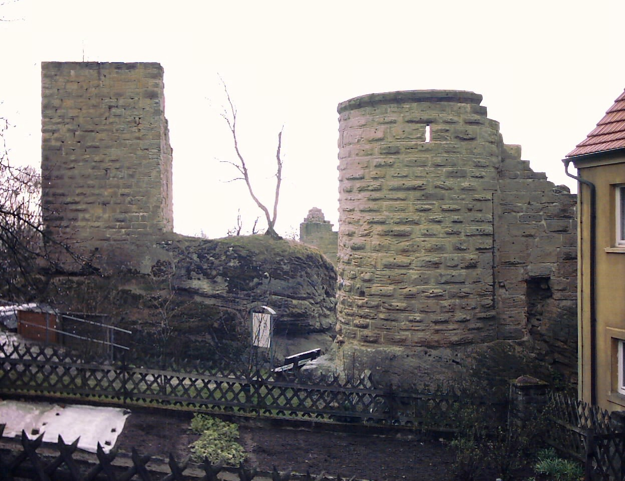 Eigene Aufnahme, 2003. Die Ruine der Nordburg